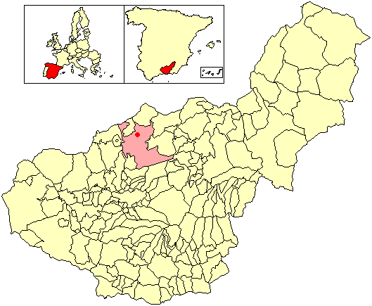 Situación del término municipal de Dehesas Viejas respecto a la provincia de Granada, en España.